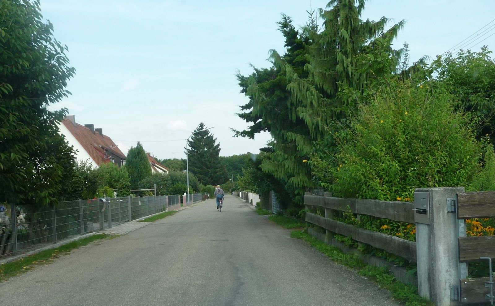 Das Wohngebiet Neuburg-Herrenwörth ist eine grüne Oase